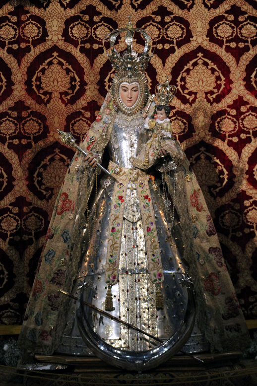 Imagen de Nuestra Señora del Rosario venerada en la Iglesia de Santo Domingo de Granada (España).